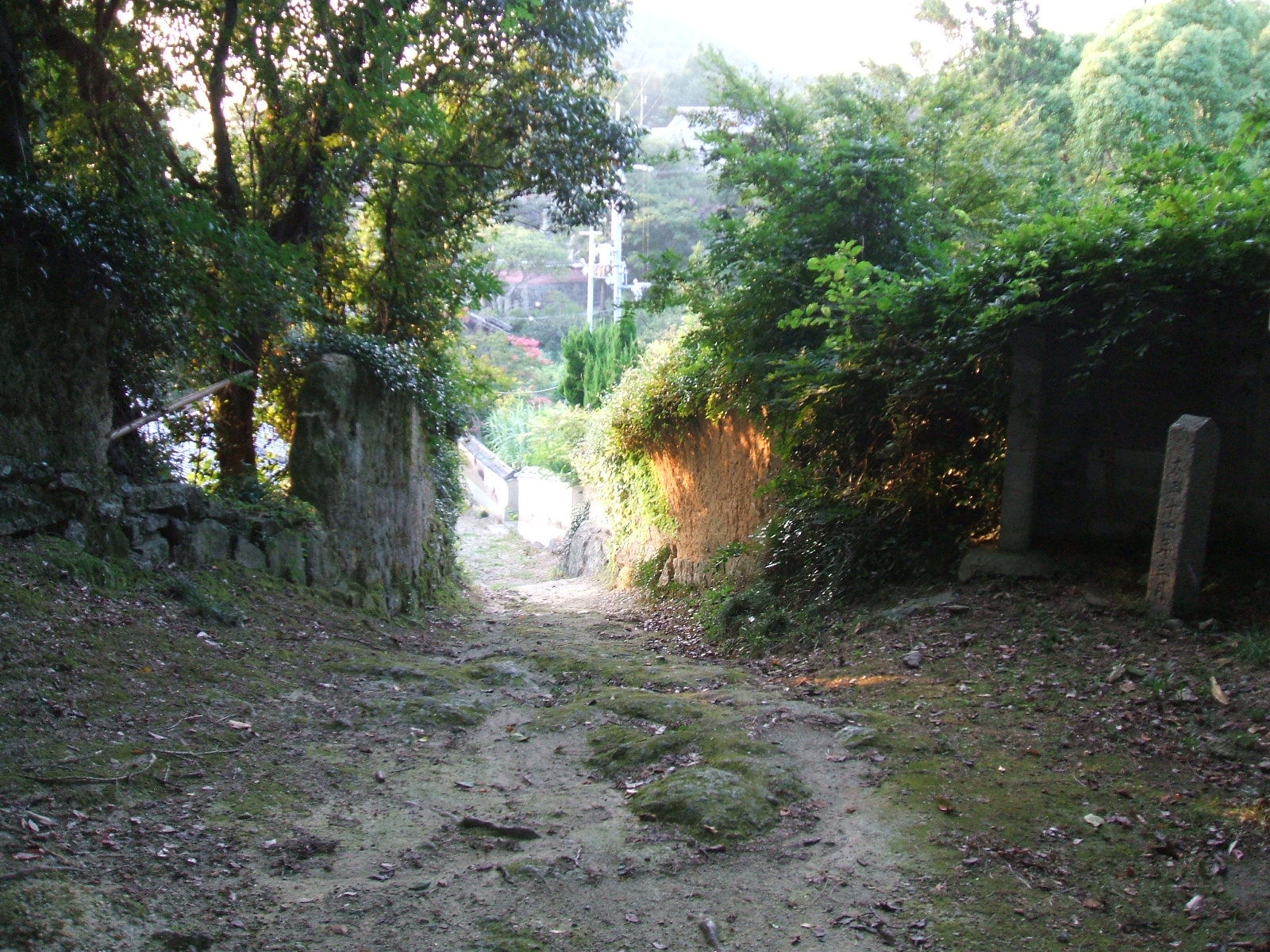 兵庫県姫路市広峰山頂に残る御師屋敷跡。かって、この山頂には30軒ほどの屋敷が立ち並び、その屋敷の主達は広峯神社の御札を売り歩いていた。